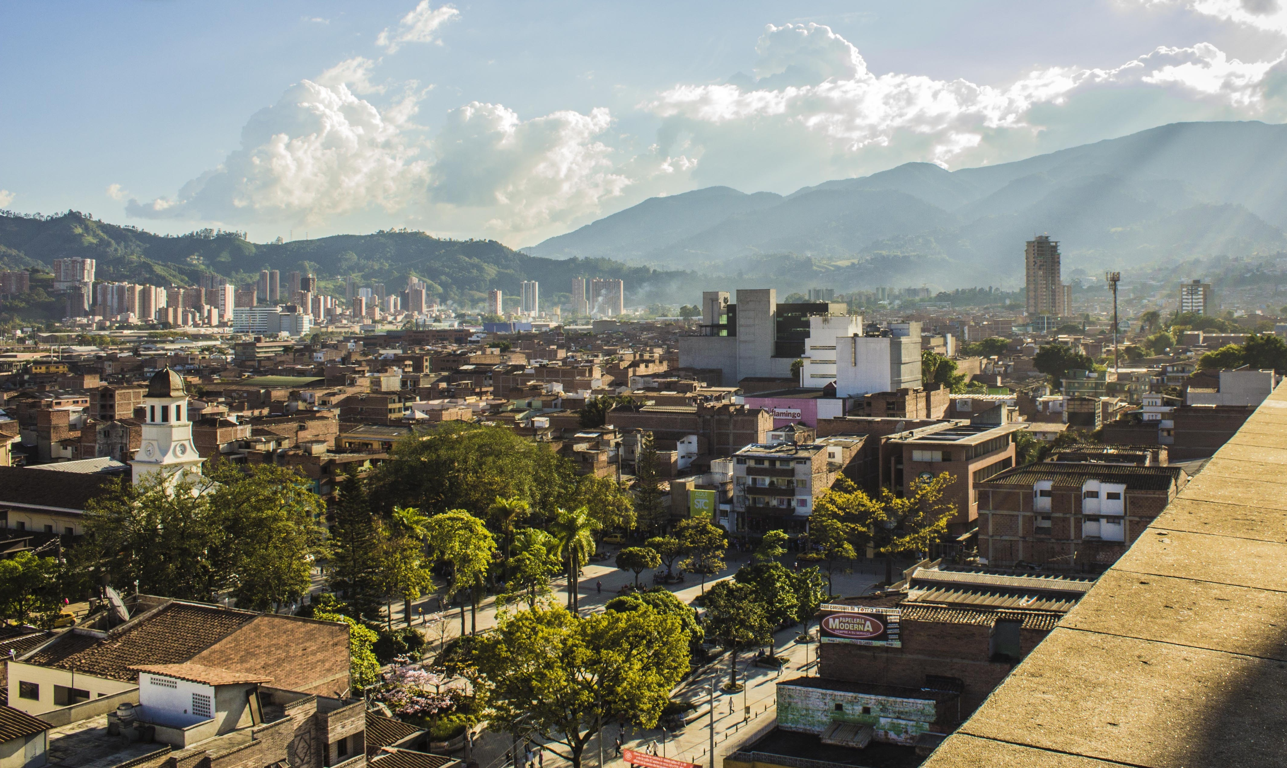 Panorámica del centro de Itagüí